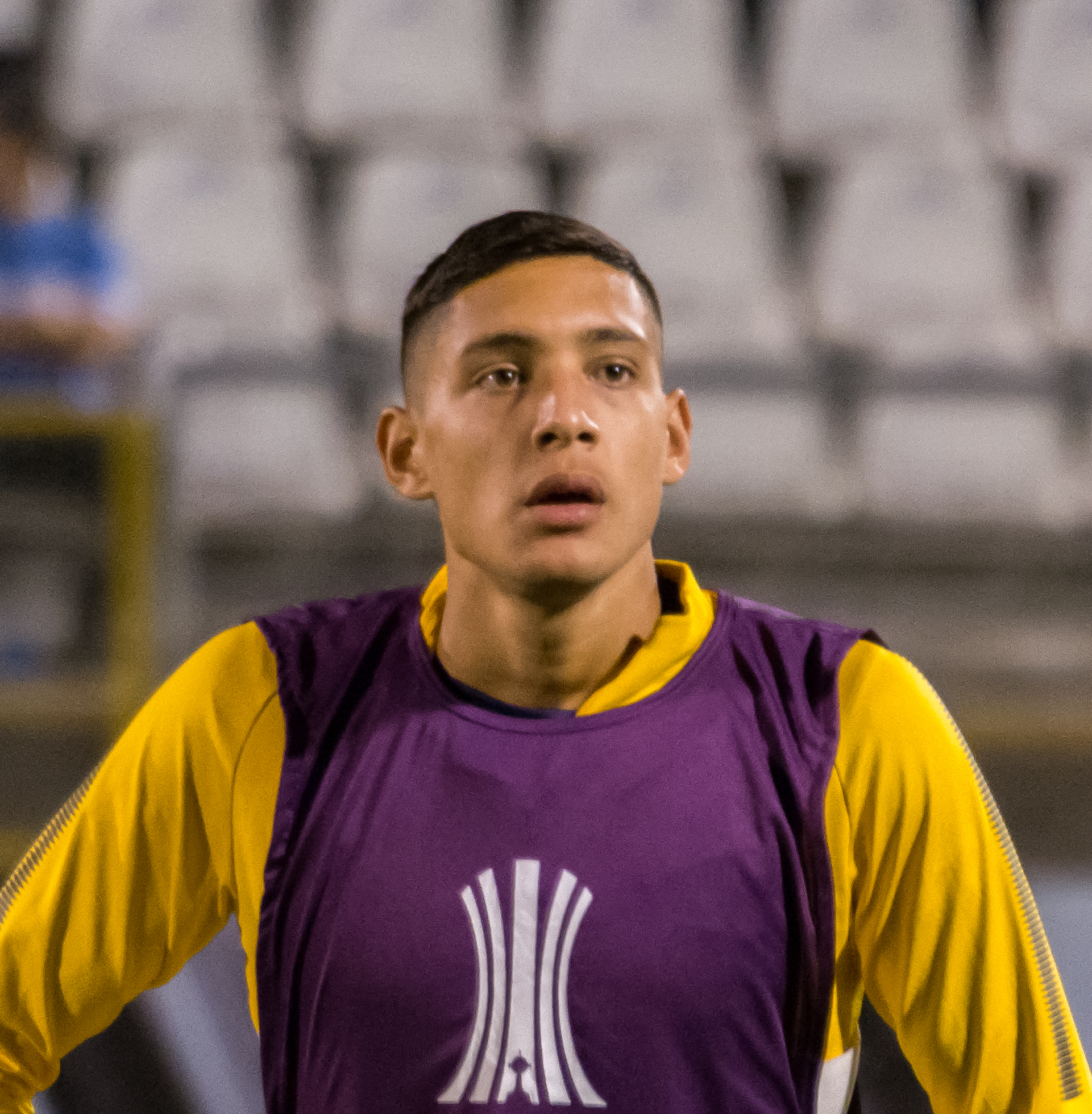 Nahuel Molina, Universidad Católica v Rosario Central, Estadio San Carlos de Apoquindo, Las Condes, Santiago, Chile.